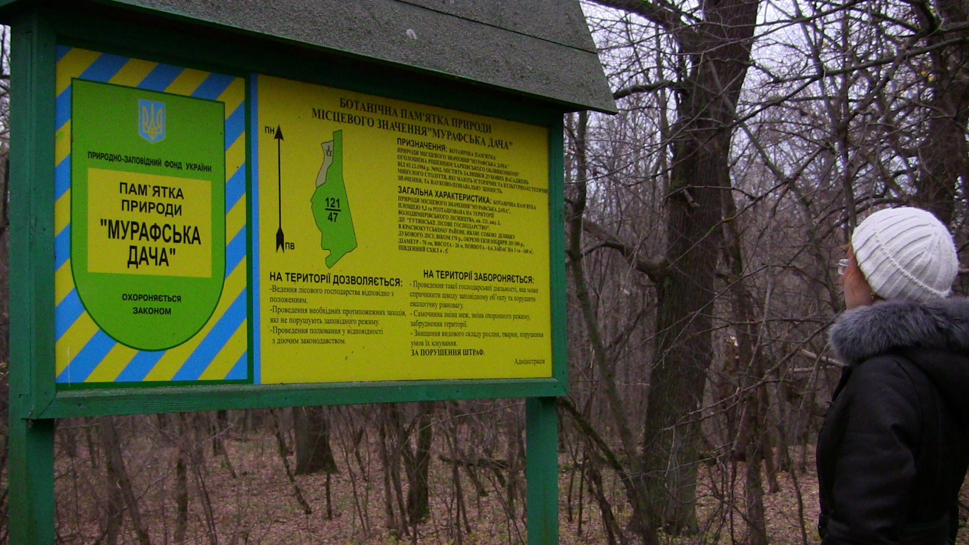 „Мурафська дача“, Краснокутський район Володимирівське лісництво, кв. 121: вид. 2